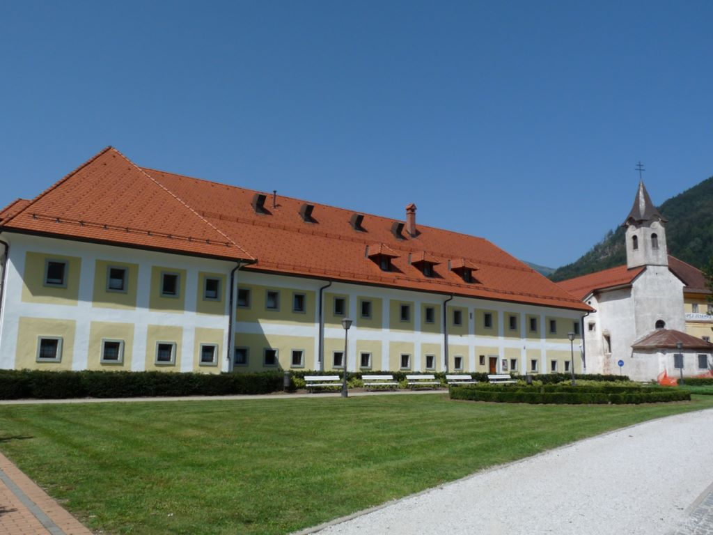 Delavska kasarna na Jesenicah